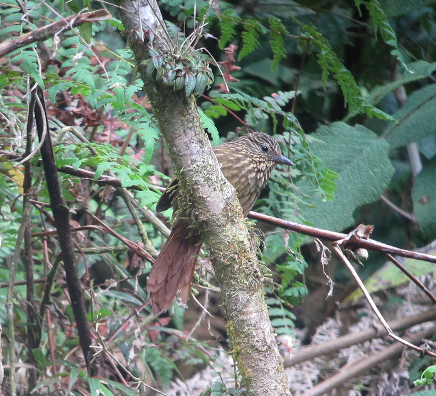 Sonsòn, Antioquia, Colombia